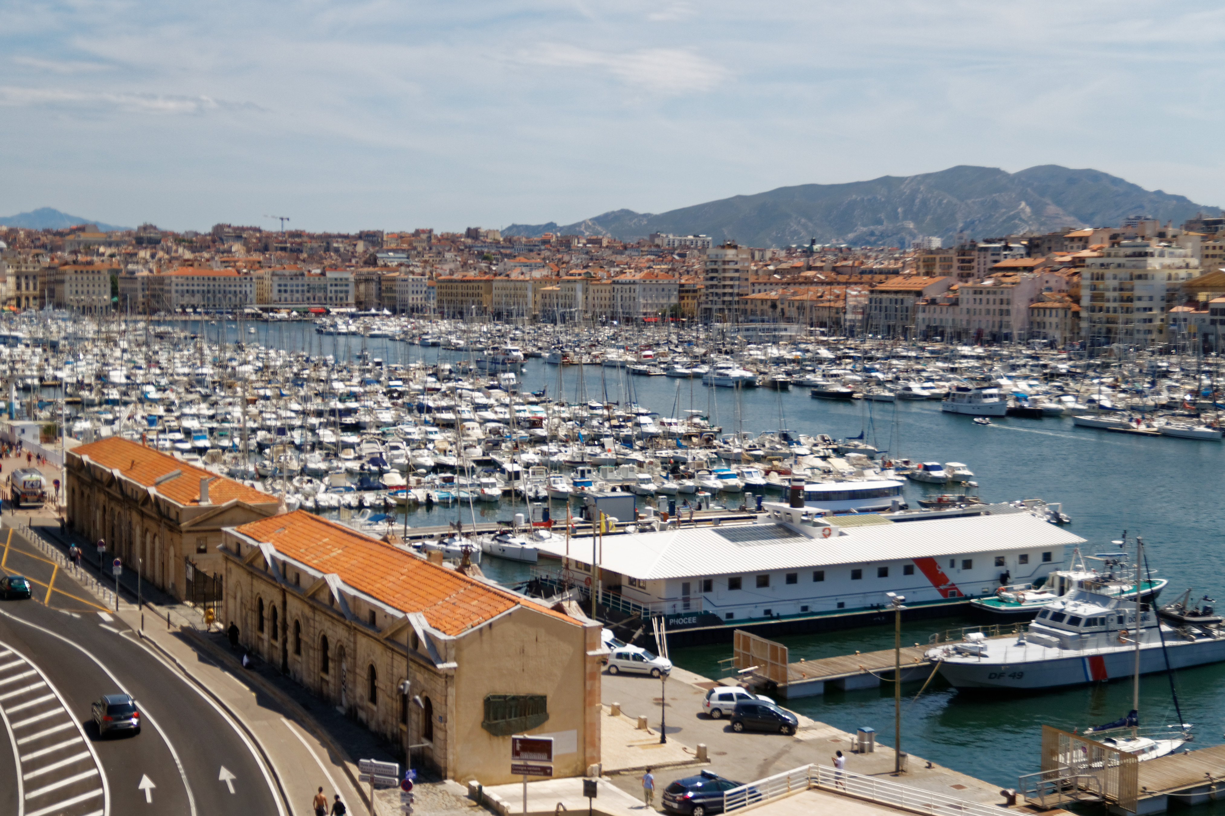 Alter Hafen (Vieux-Port) von Marseille, vom Fort Saint-Jean aus gesehen